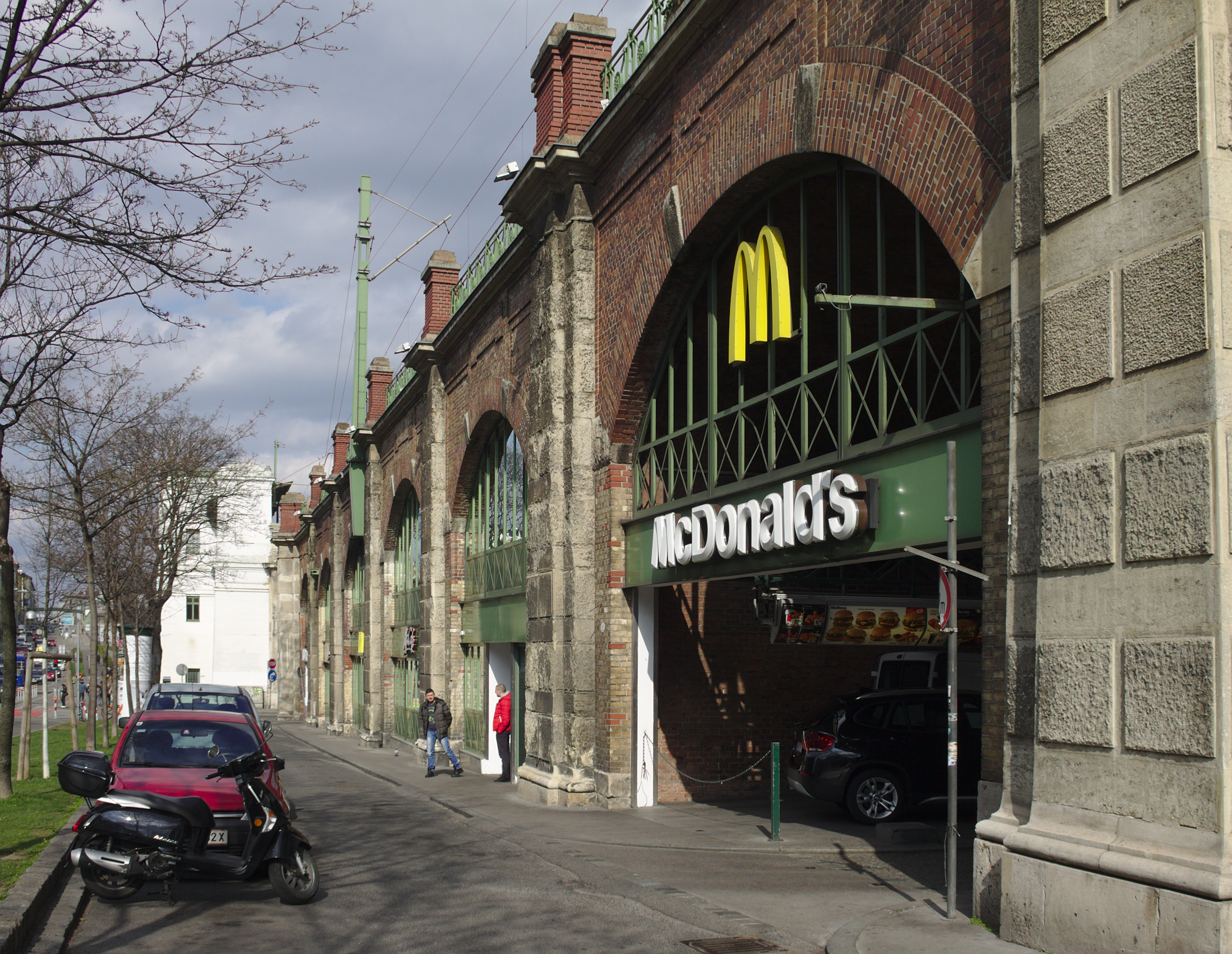 ehem. Stadtbahn - Teilbereich der heutigen U6